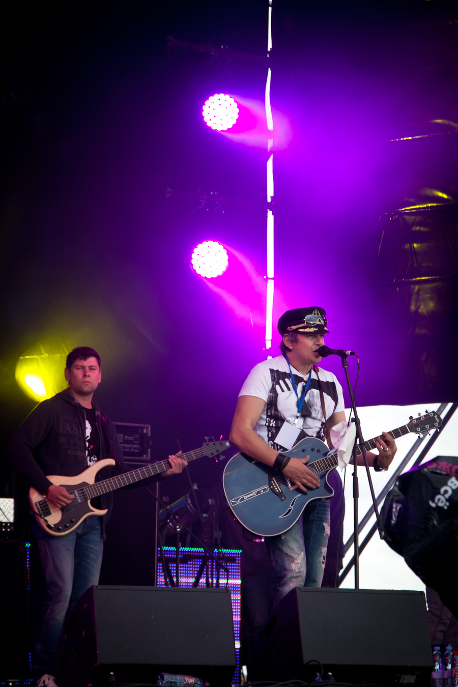 Российская рок-группа «7Б» выступает на «рок-фестивале Остров» (о. Краснофлотский, Архангельск). Организатор фестиваля — концертное агентство «ORLANDINA».